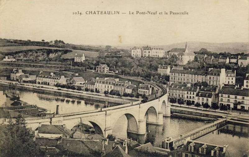 Viaduc Réseau Breton de Châteaulin